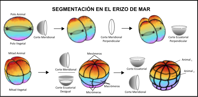 Fig.1 pipe